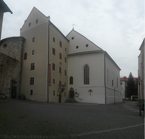 Pohľad na vstup do kostola